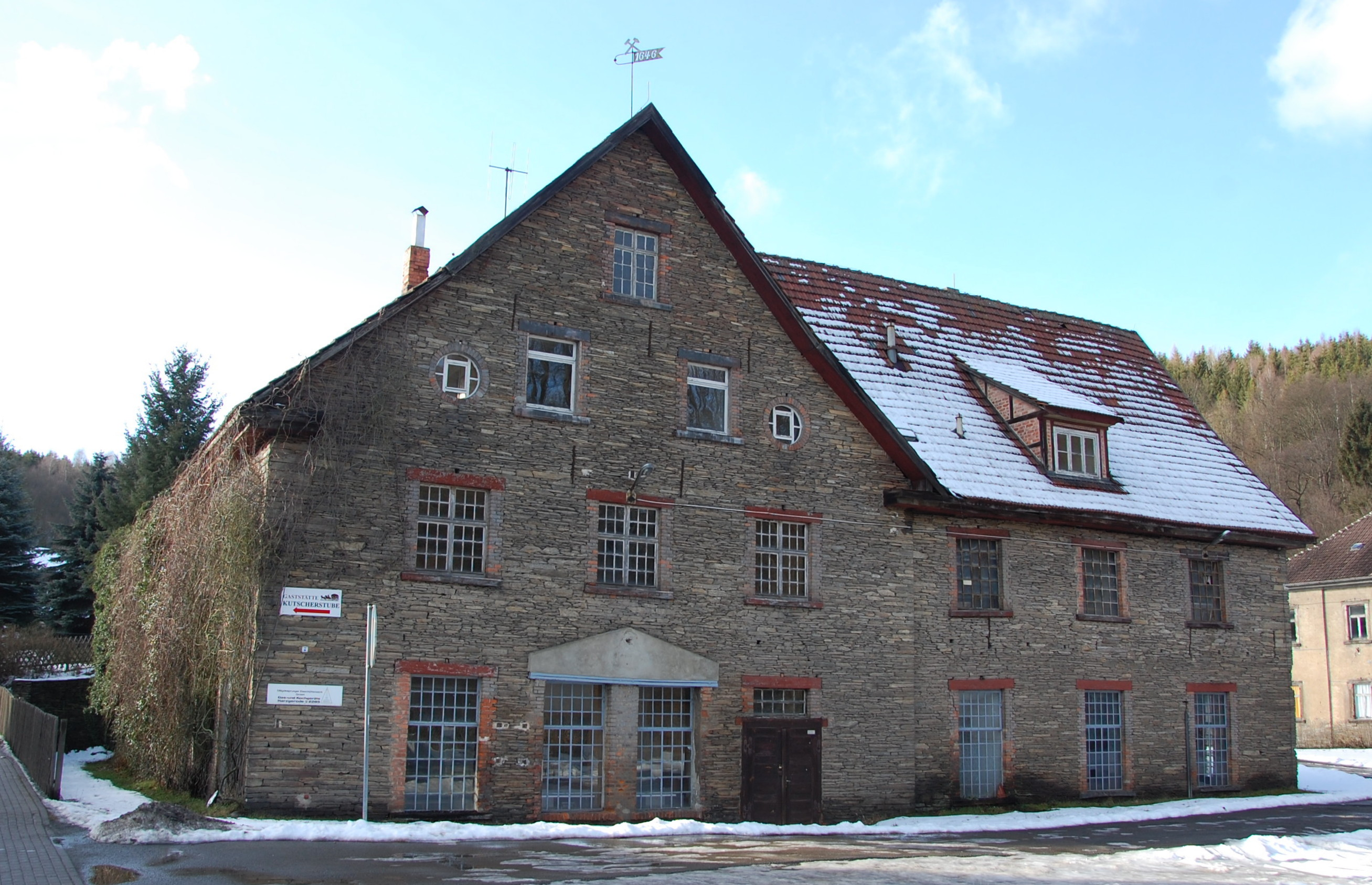 Fabrikgebäude im Hüttenwerk in Mägdesprung